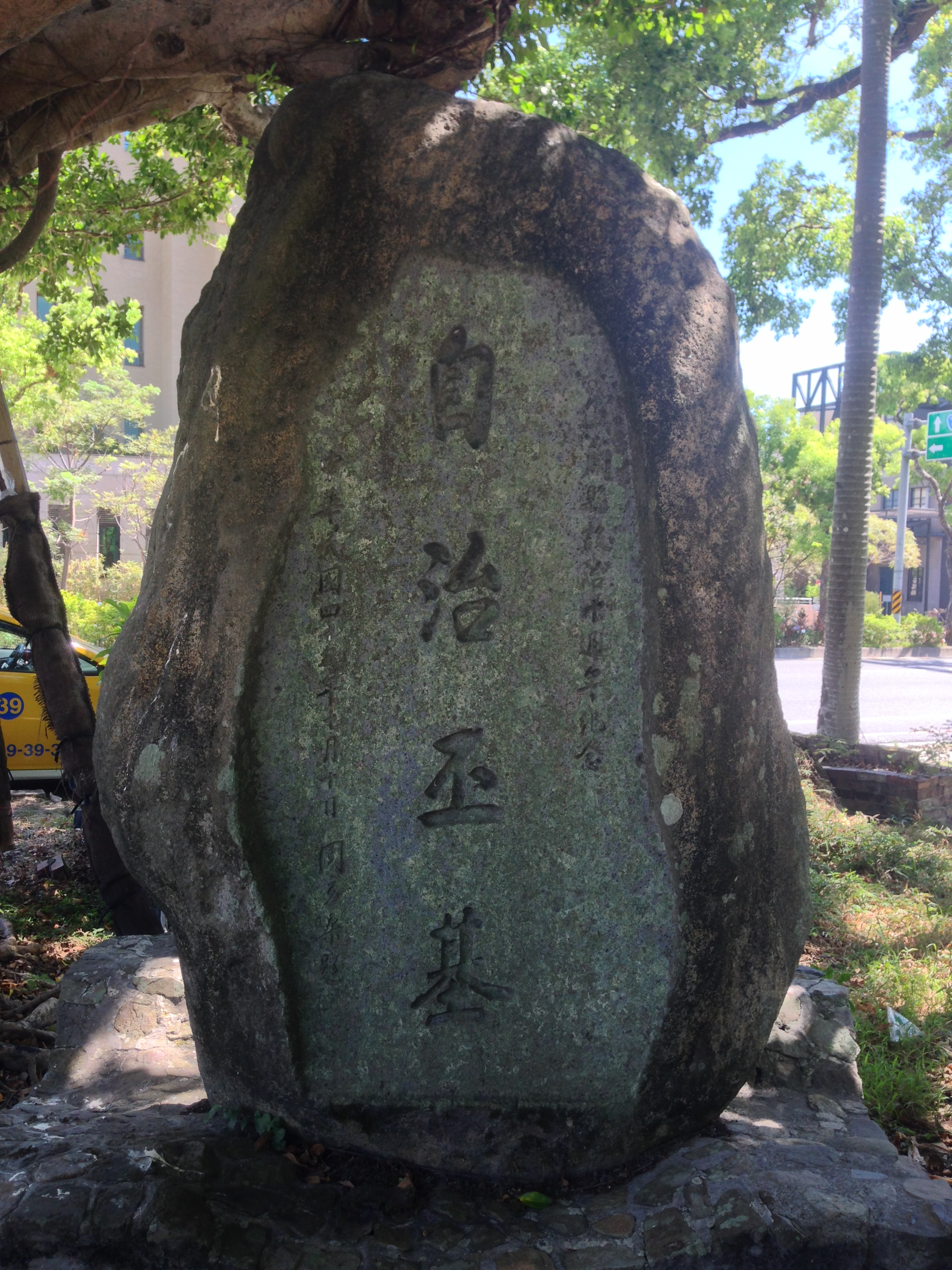 中文（台灣）: 宜蘭縣設縣紀念碑，周至柔題字。